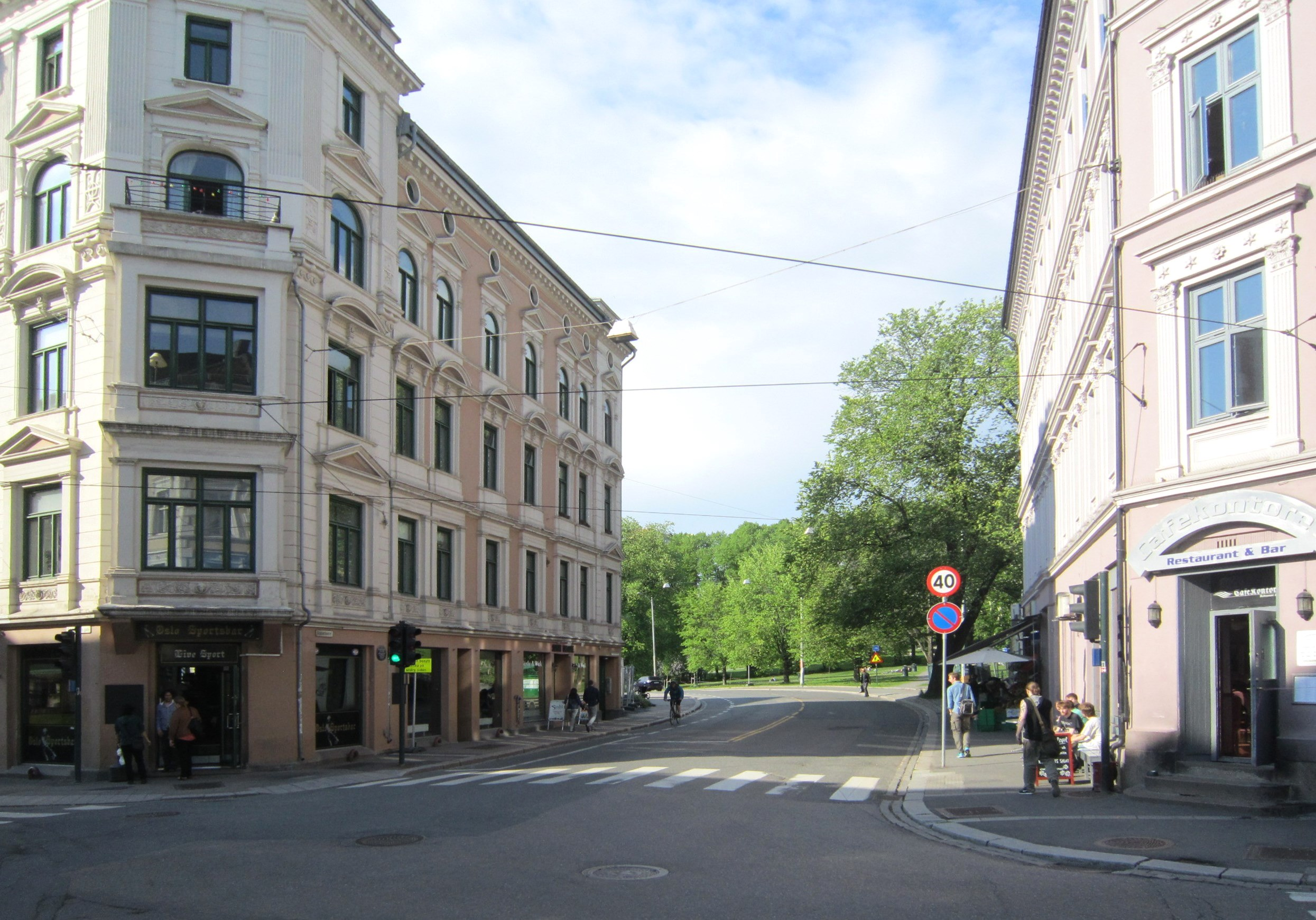 Grønlandsleiret i krysset ved Schweigaards gate